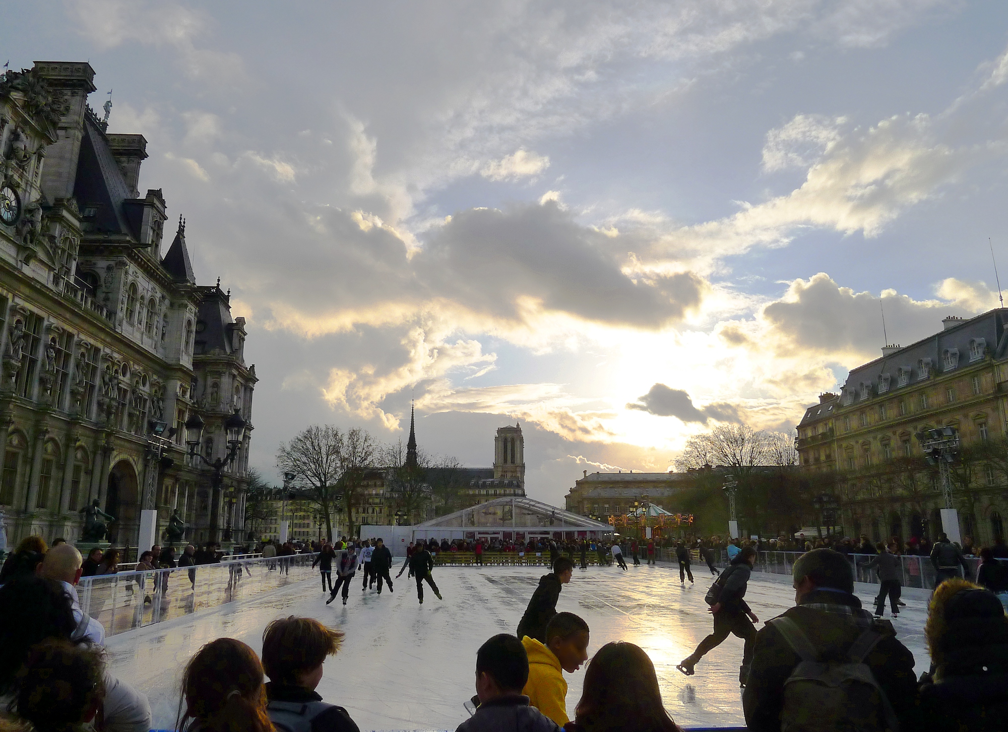 Place de l'Hôtel-de-Ville lors des fêtes de fin d'année avec la présence d'une patinoire - Paris IV